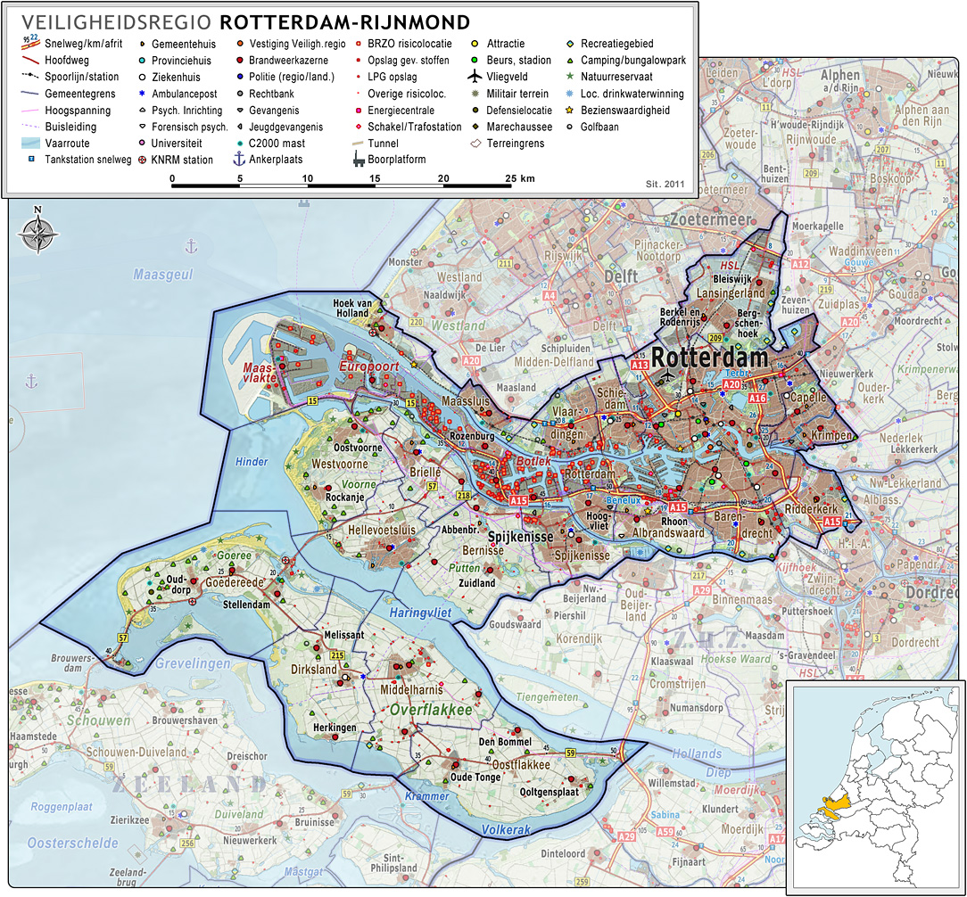 Veiligheidsregio Rotterdam-Rijnmond, met indeling van gemeenten (2011) en impressie van het landschap. Door Jan-Willem van Aalst, samengesteld uit publiek beschikbare geo-data: Referentie-ondergrond (kustlijn, steden, wegen) gerasterd uit de OpenStreet Map OSM. ( Inhoud is beschikbaar onder de Creative Commons Attribution-ShareAlike 3.0 license. Referentie-ondergrond op water bewerkt vanuit Gebruik is vrij met bronvermelding NLR en ESA. Vectorgrenzen van gemeenten en regio's vrij ter beschikking gesteld met dank aan cartografen van brandweerregio's Hollands-Midden en IJsselland; gerasterd in Adobe Photoshop. Grenzen en kazernes in Duitsland en België vrij ter beschikking gesteld met dank aan Meldkamer Oost-Nederland, Regio Limburg-Noord en Regio Midden- en West-Brabant Hoogte-aanduidingen (reliëf) gerasterd uit de AHN Viewer ( gebruik is vrij met bronvermelding (c) AHN, BRZO risicolocaties, LPG risicolocaties, buisleidingen: op basis van de Risicokaart, Defensie locaties op basis van de lijst op Locaties C2000 masten op basis van Penitentiaire locaties op basis van Rijksoverheid site Recreatieve verblijfslocaties op basis van gebruik is vrij met bronvermelding "(c) Kenniscentrum Recreatie". Natuurreservaten op basis van Kilometerpalen (iedere 5 km) op basis van Stichting Incident Management Nederland ( vrij bruikbaar met bronvermelding Overige kenmerken op de kaart: eigen tekenwerk van Jan-Willem van Aalst, op basis van OpenStreet Map en gerasterde CBS gemeentegrenzen.